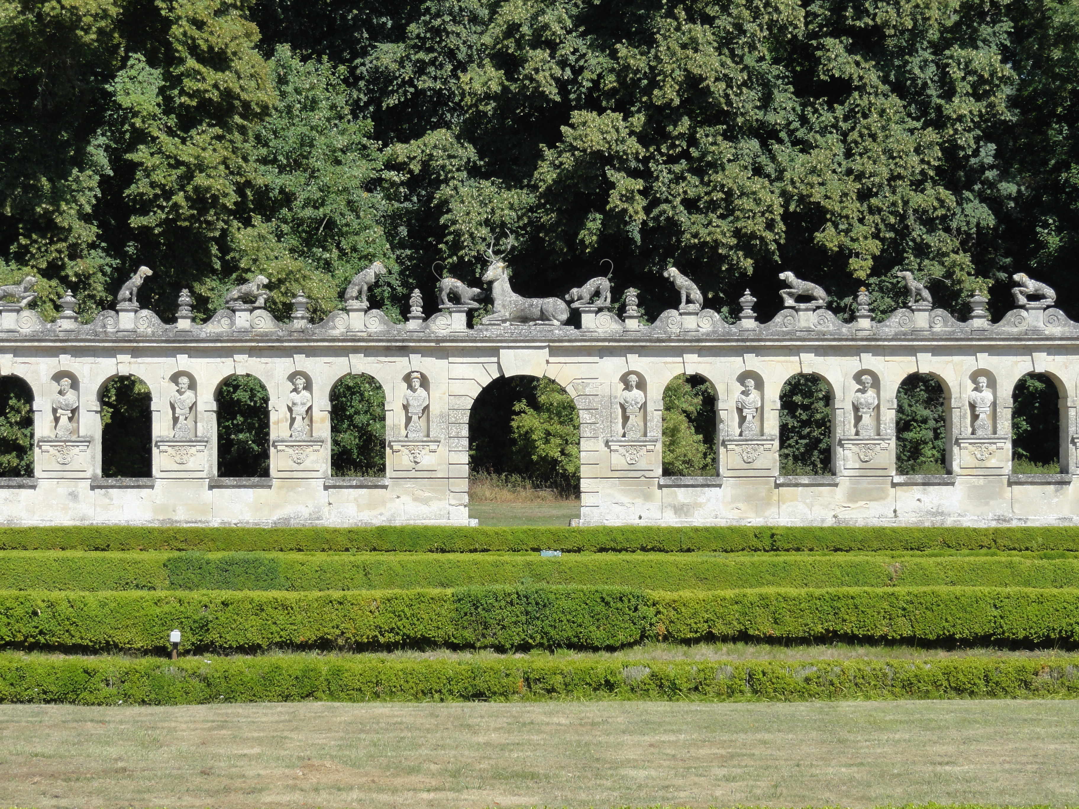 Haie cygénétique nord.